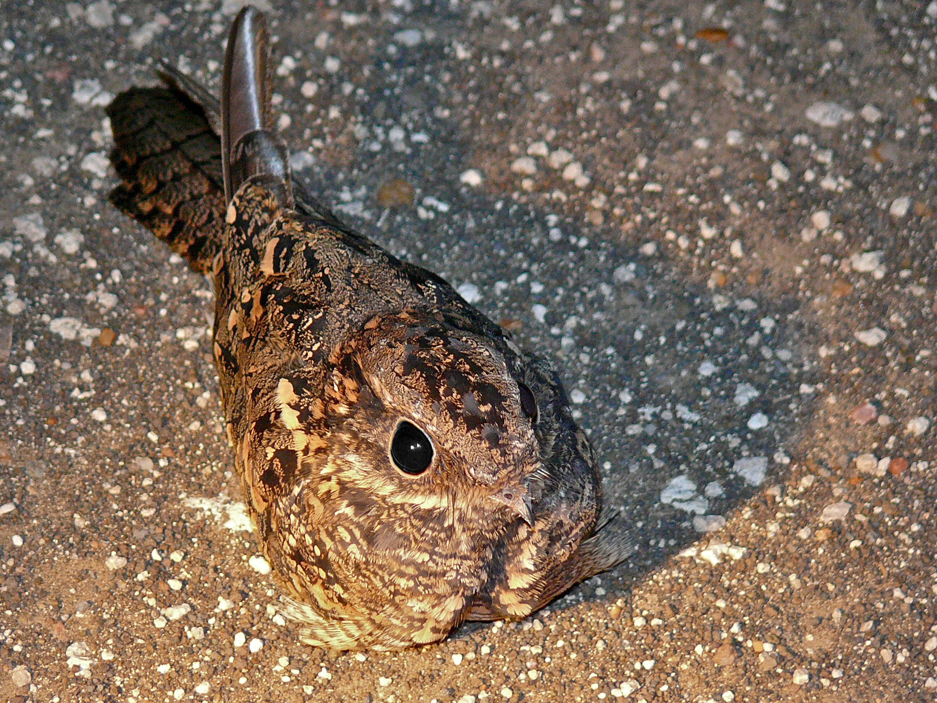 Shingwedzi Night Drive, Kruger NP, SOUTH AFRICA